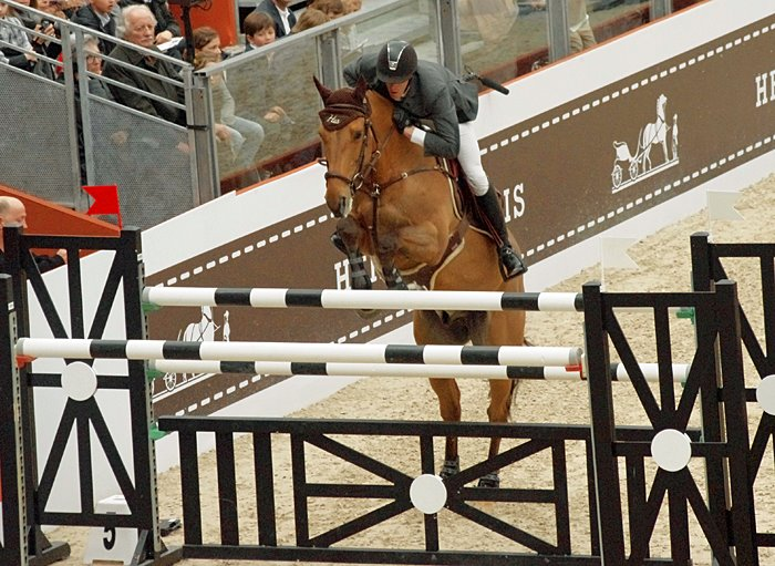 Kevin Staut et Le Prestige St-Lois*de Hus lors du Saut Hermès au Grand Palais à Paris (mars 2012).